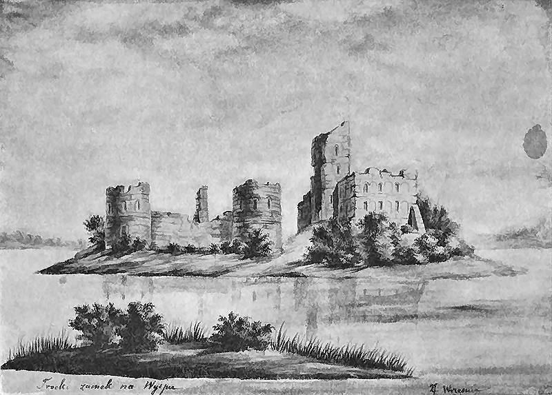 "Troki nad jeziorem Trockiem." (Troki on the Troki Lake), a sketch by Napoleon Orda ca. 1877, pencil and watercolours